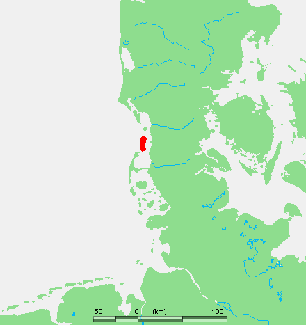 Wadden - Romo.PNG